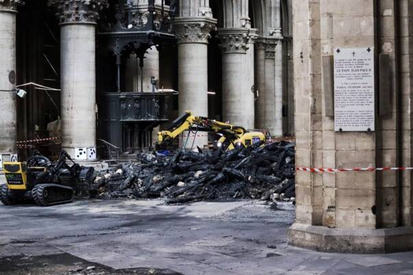 Notre-Dame de Paris